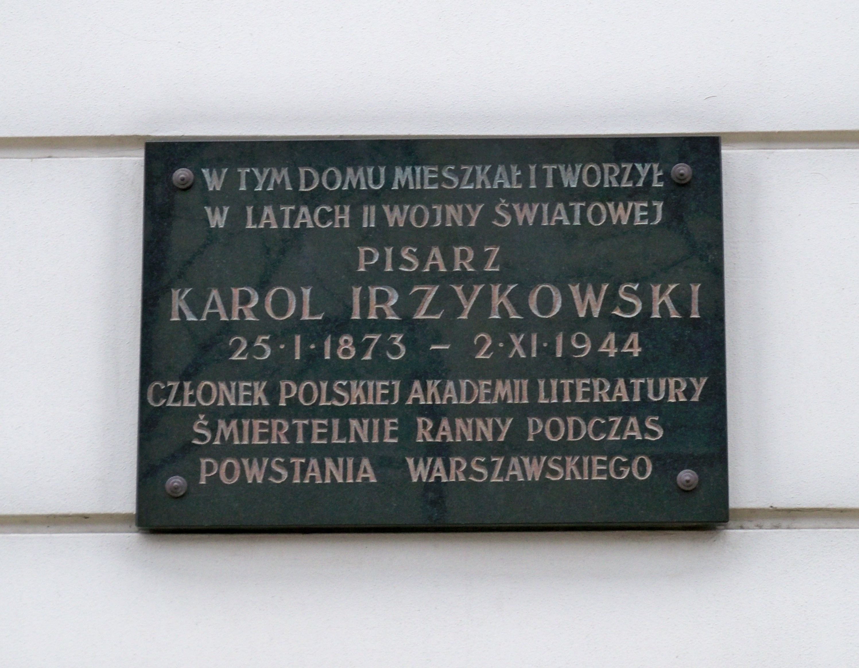 Tablica na domu przy ul. Filtrowej 75 w Warszawie upamiętniająca Karola Irzykowskiego